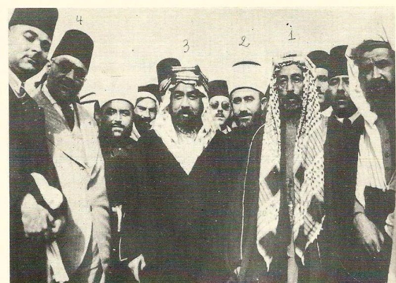 صورة أخذت أثناء رحلة الشيخ الثعالبي إلى المشرق العربي ويبدو فيها بالترتيب، 1) الملك علي بن الحسين ملك الحجاز، 2) الشيخ أمين الحسيني مفتي القدس، 3) الملك عبد الله بن الحسين مؤسس المملكة الأردنية الهاشمية، 4) الشيخ عبد العزيز الثعالبي.